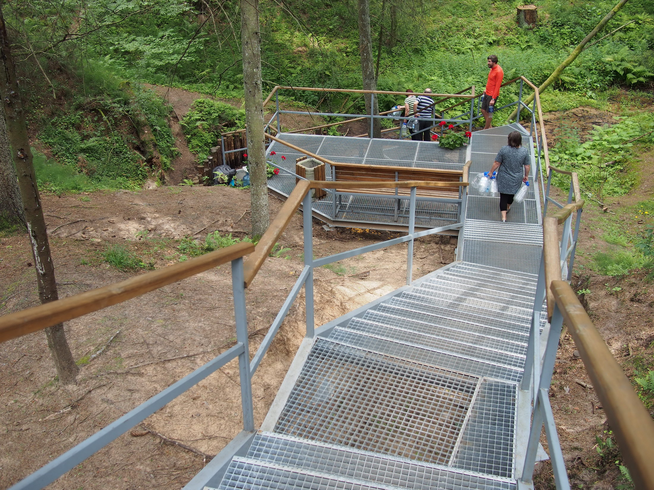 2016 m. pastatyti metalo tinklo laiptai, vedantys iki Lekėčių šaltinio